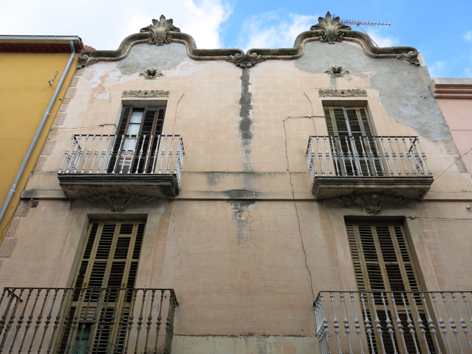 Habitatge al carrer Montserrat, 10-12 (Esparreguera)